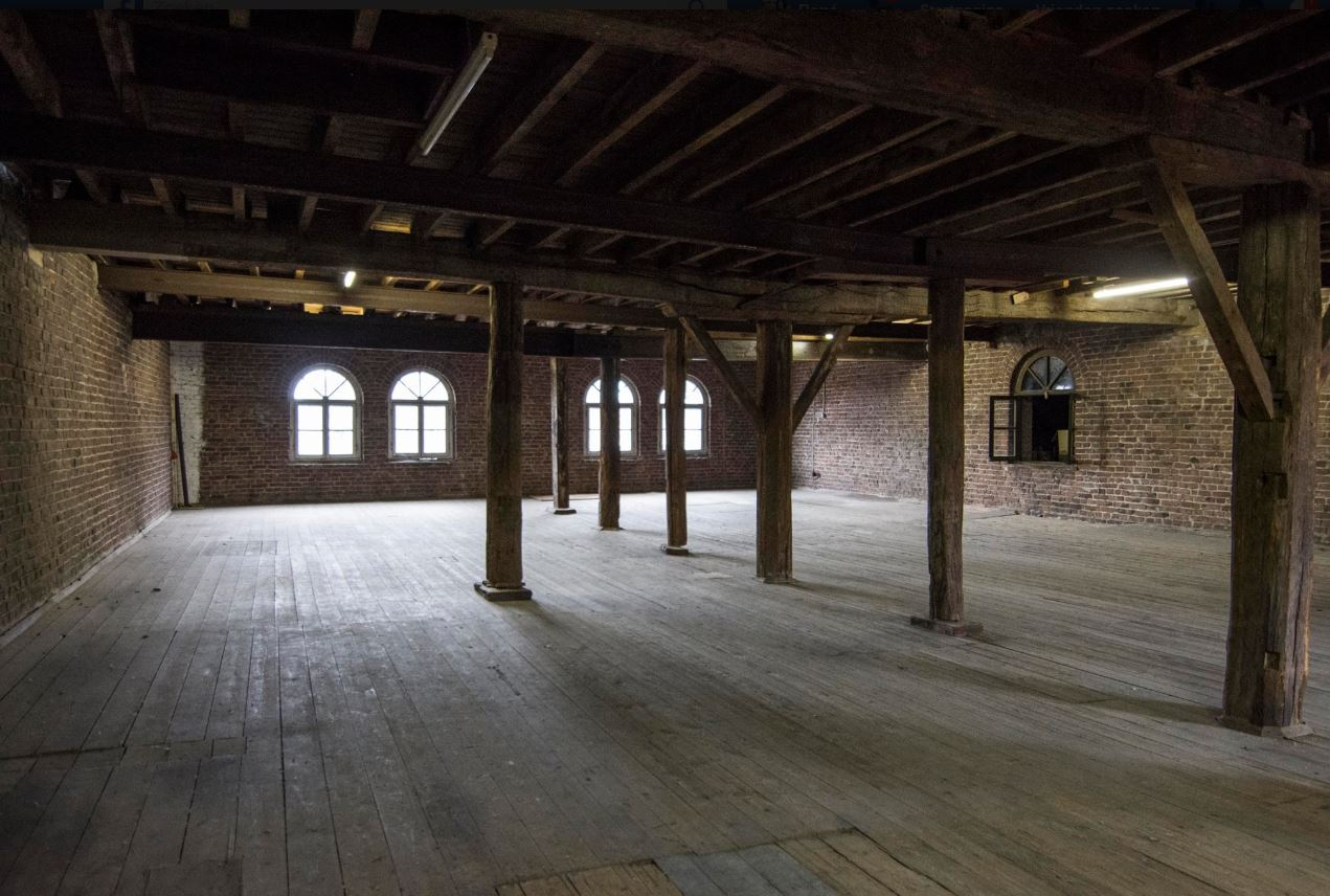 Mälzerei